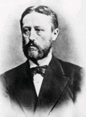 Foto des Historikers Carl von Noorden